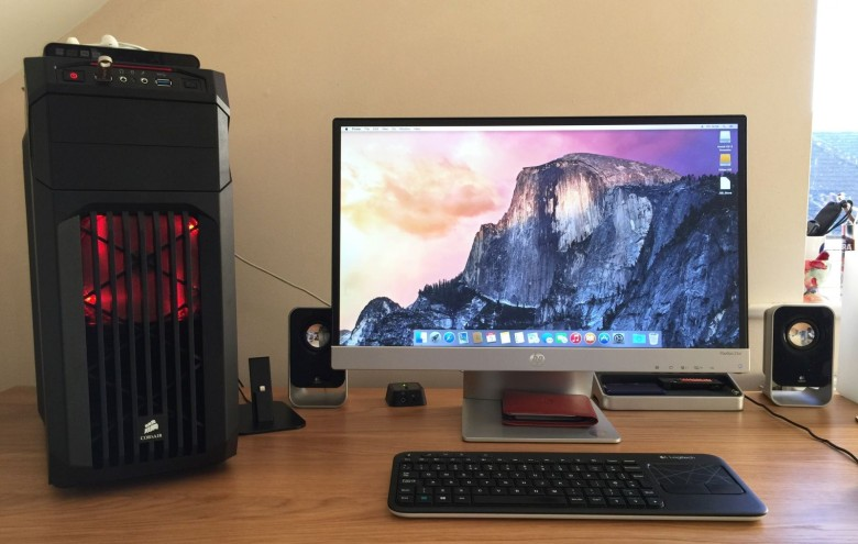 OS X 10.10 Yosemite yüklü CustoMac